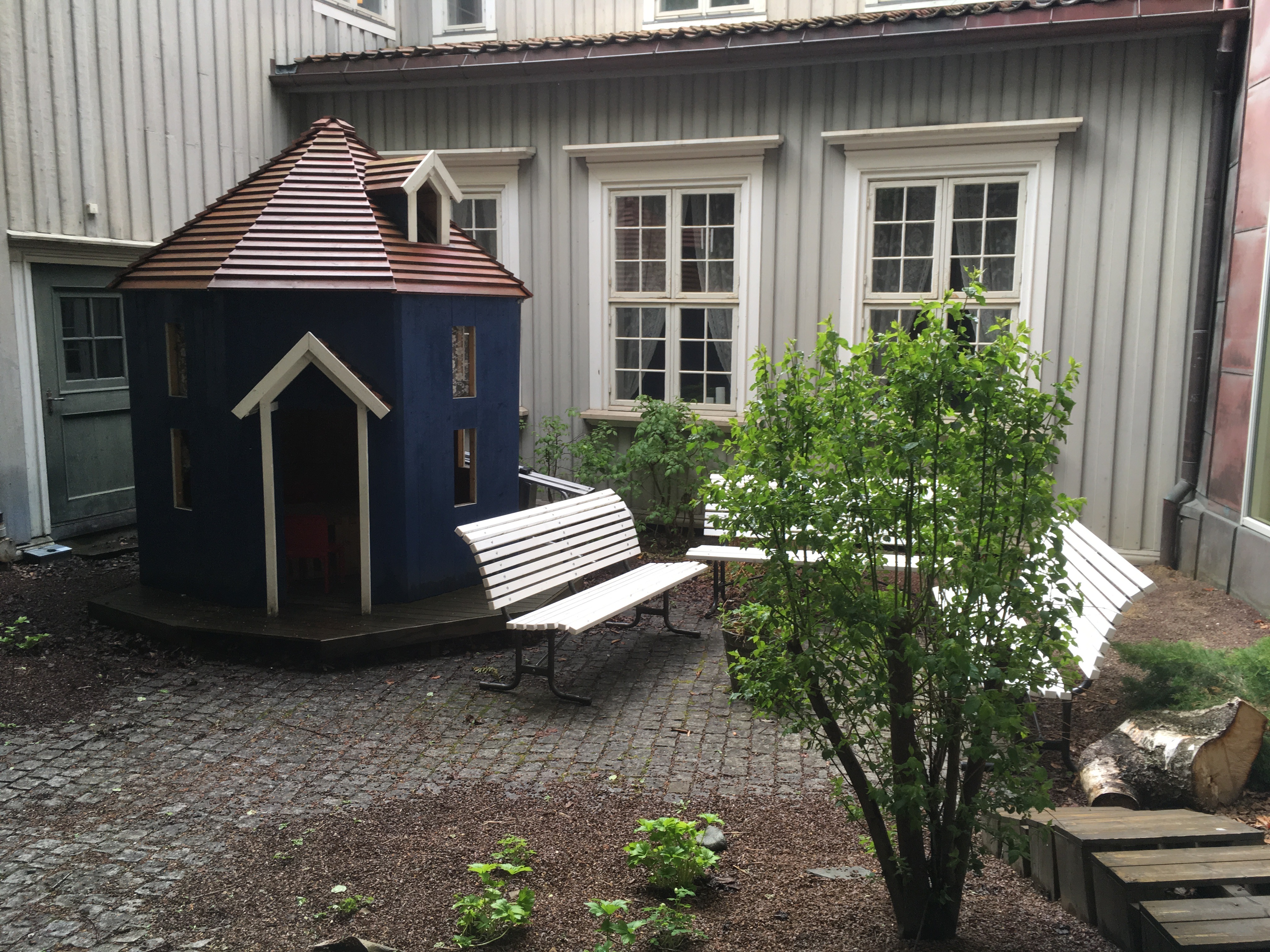 Gamle og nye bygninger er sammenbygget og danner Trondheim folkebibliotek, hovedbiblioteket. Mellom disse dannes en gård, en bibliotekhage